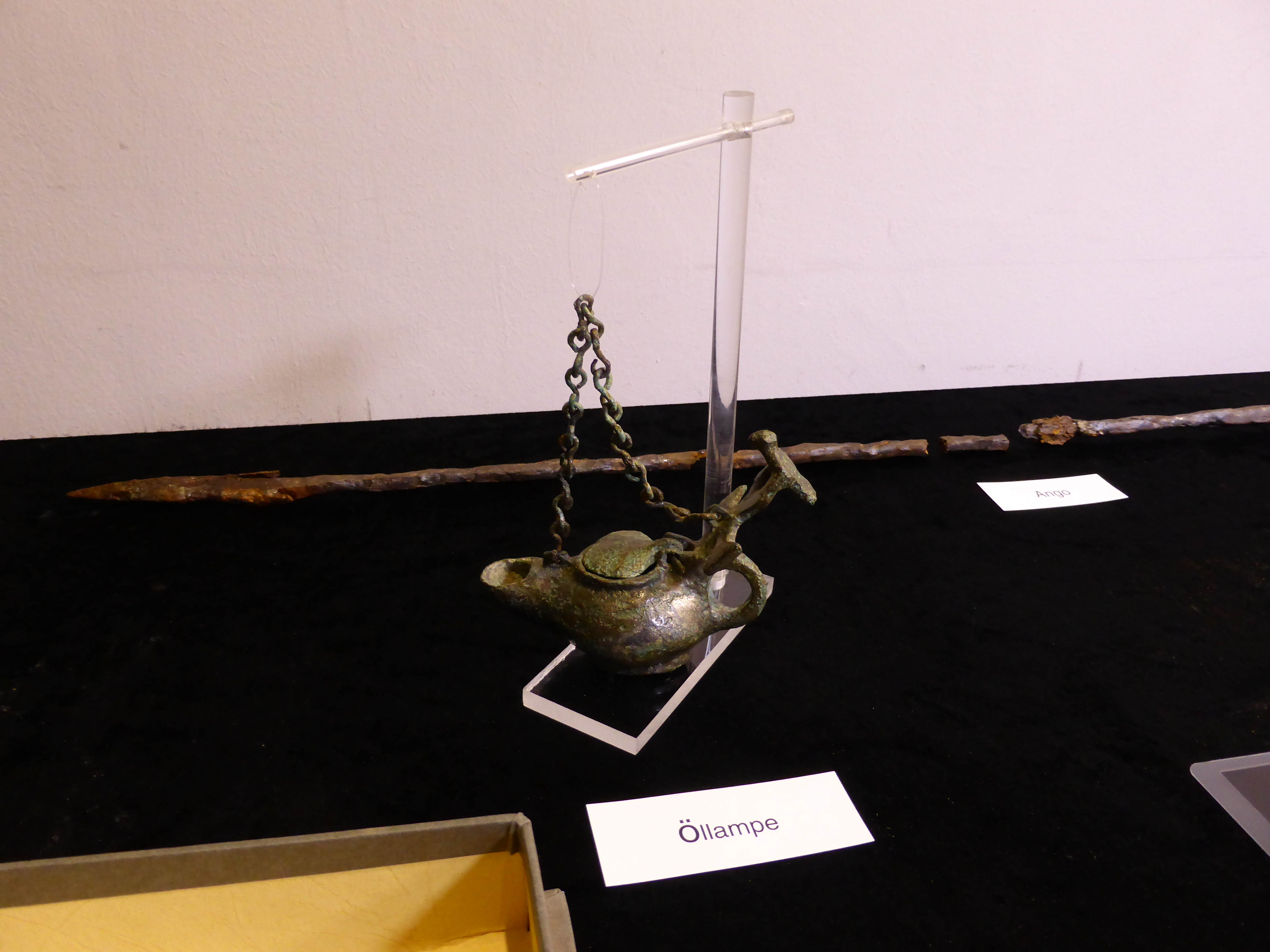 Byzantinische Lampe (Befund 96) mit christlicher Symbolik (Koptisch)